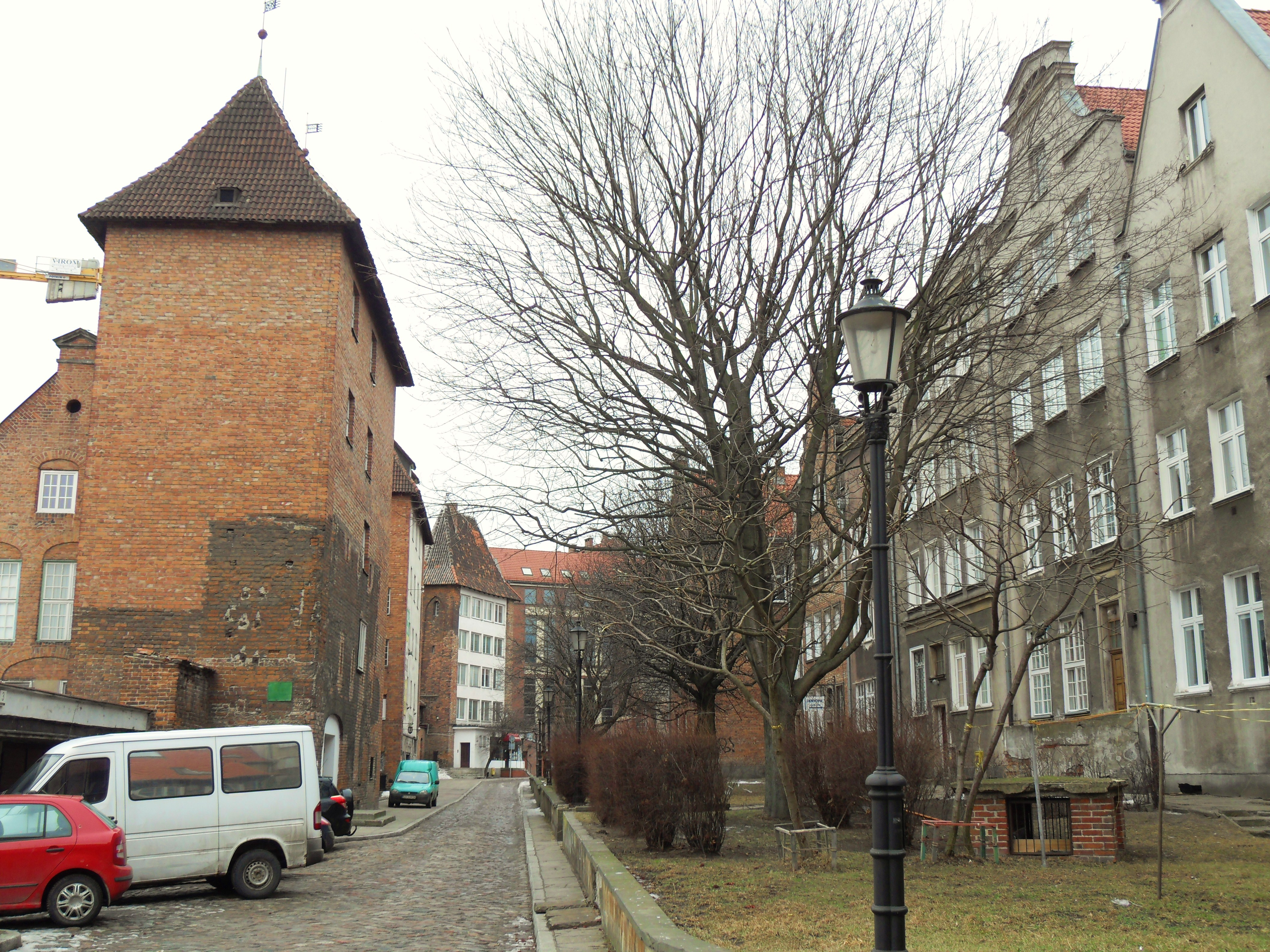 Gdańsk Główne Miasto, ul. Za Murami i Baszta Browarna.